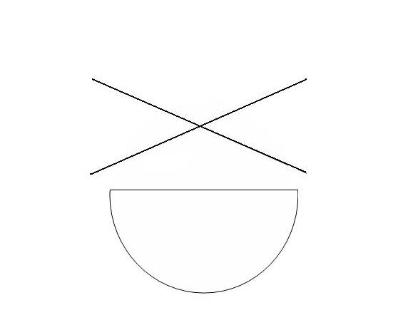 Visualização do simbolo XD.